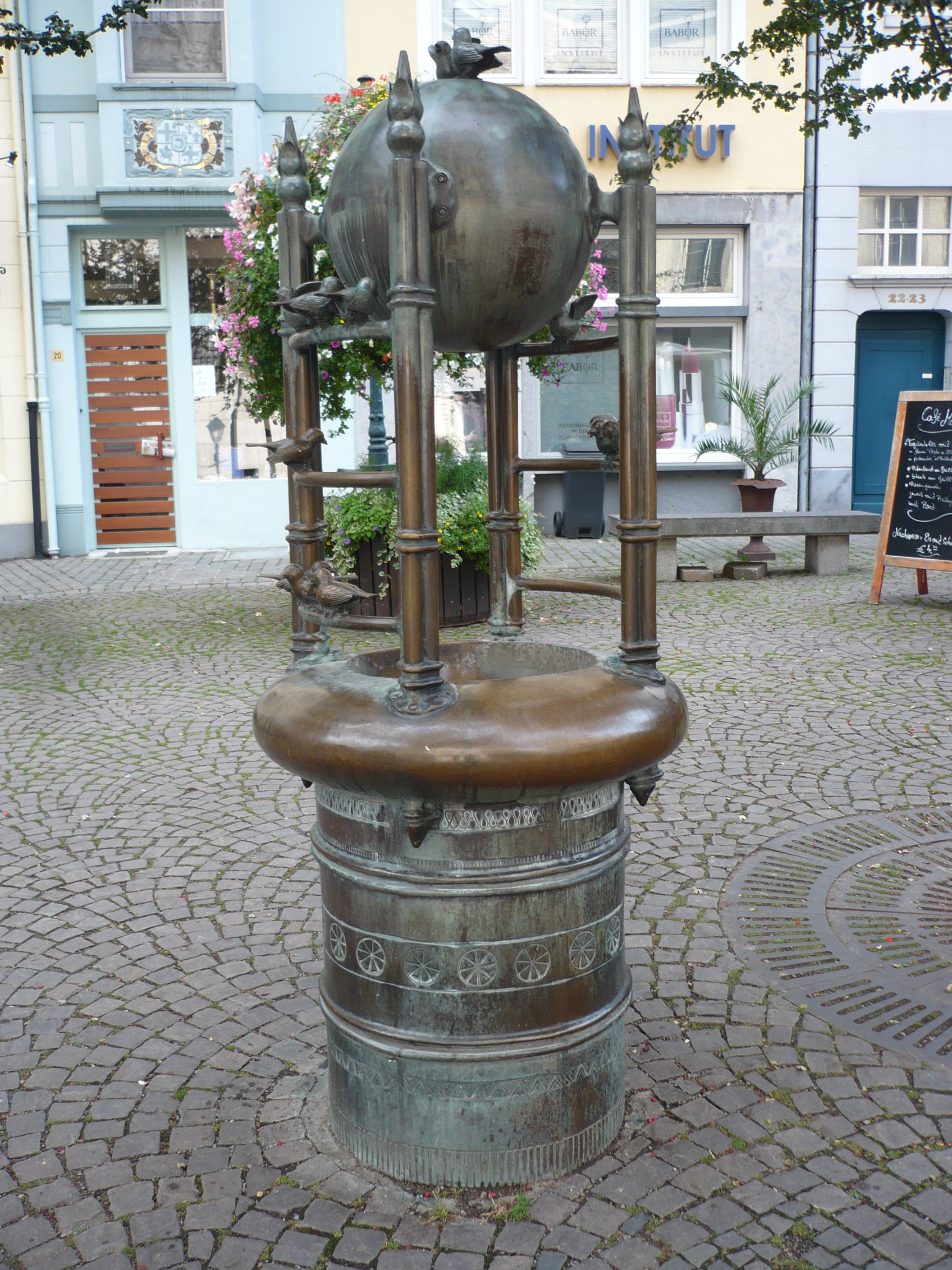 Möschebrunnen in Aachen von Bonifatius Stirnberg, 1976